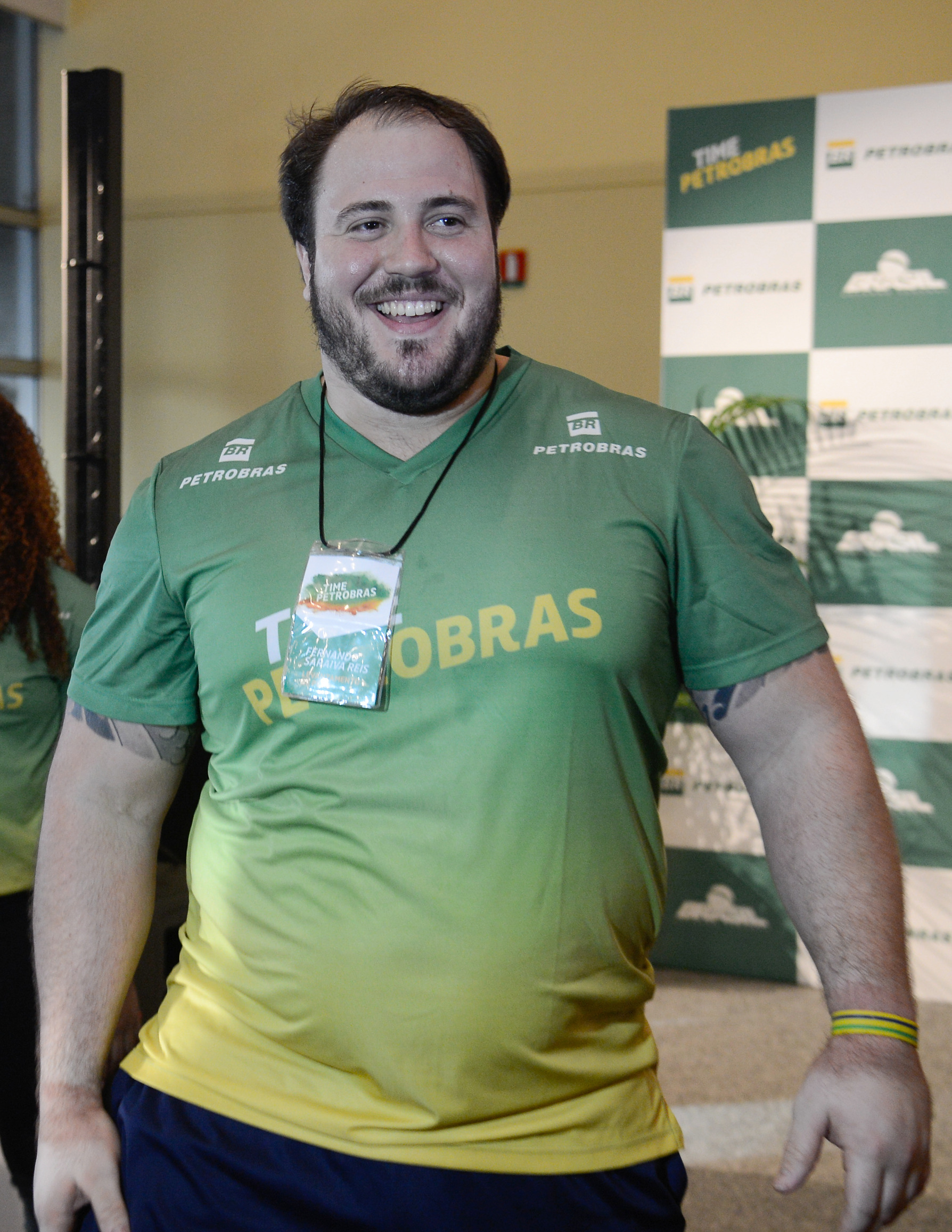 Rio de Janeiro - O atleta do levantamento de peso Fernando Saraiva Reis durante recepção aos atletas olímpicos que representam o Brasil nos Jogos Rio 2016 patrocinados pela Petrobras (Fernando Frazão/Agência Brasil)